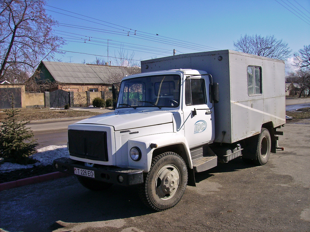 Автомобиль компании ИДК в Тирасполе.